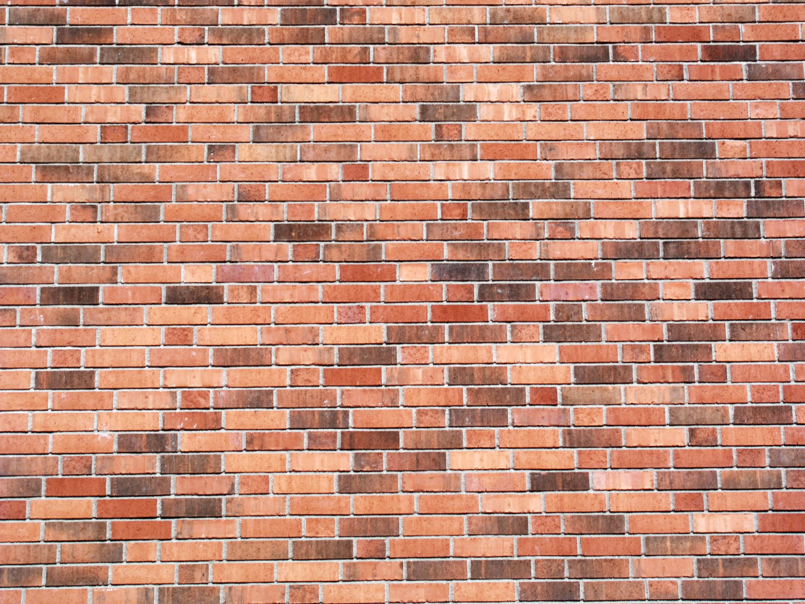 Solna, Sweden. Brick wall. Vilt förband.